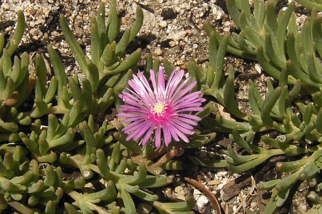 和名: マツバギク (Matsuba-giku)